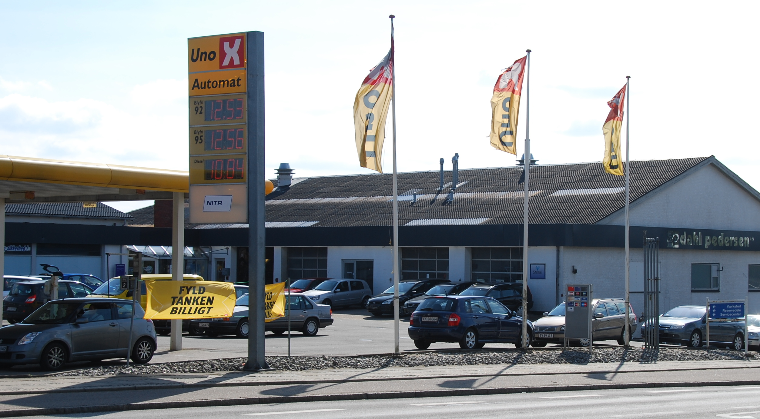 Uno-X tankstation, placeret på Holstebrovej 1 i Viborg, Danmark.